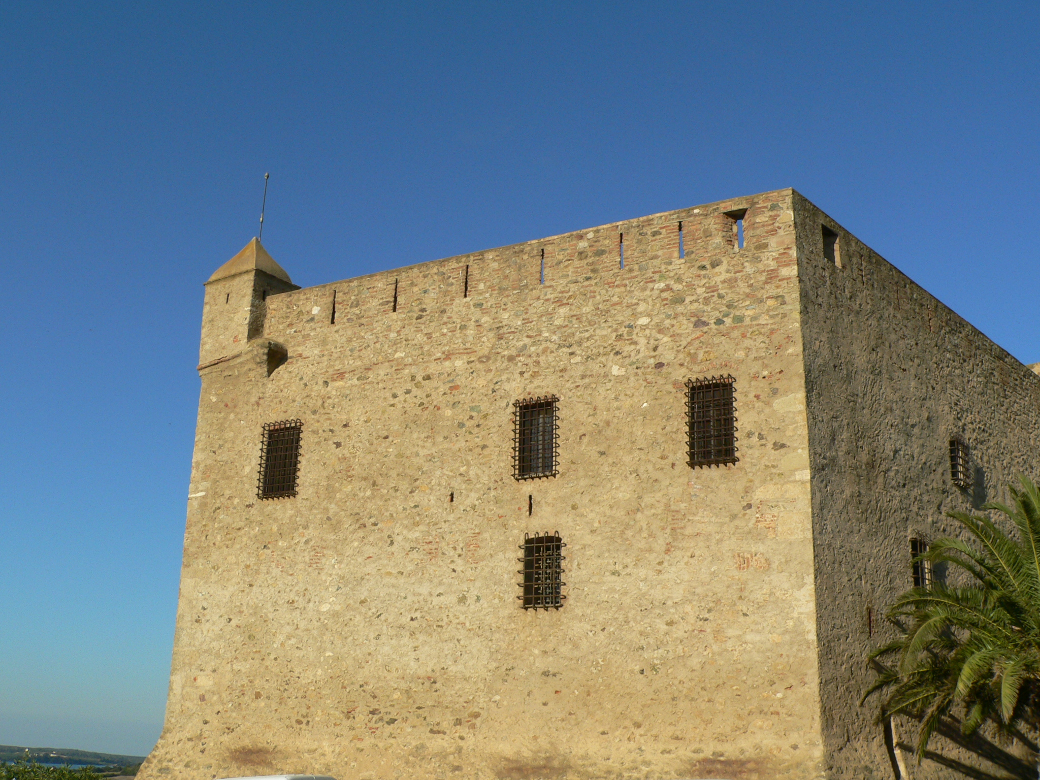 Fort de Matra Ce fort abrite le Musée départemental d'archéologie Jérôme Carcopino Aleria, Haute-Corse